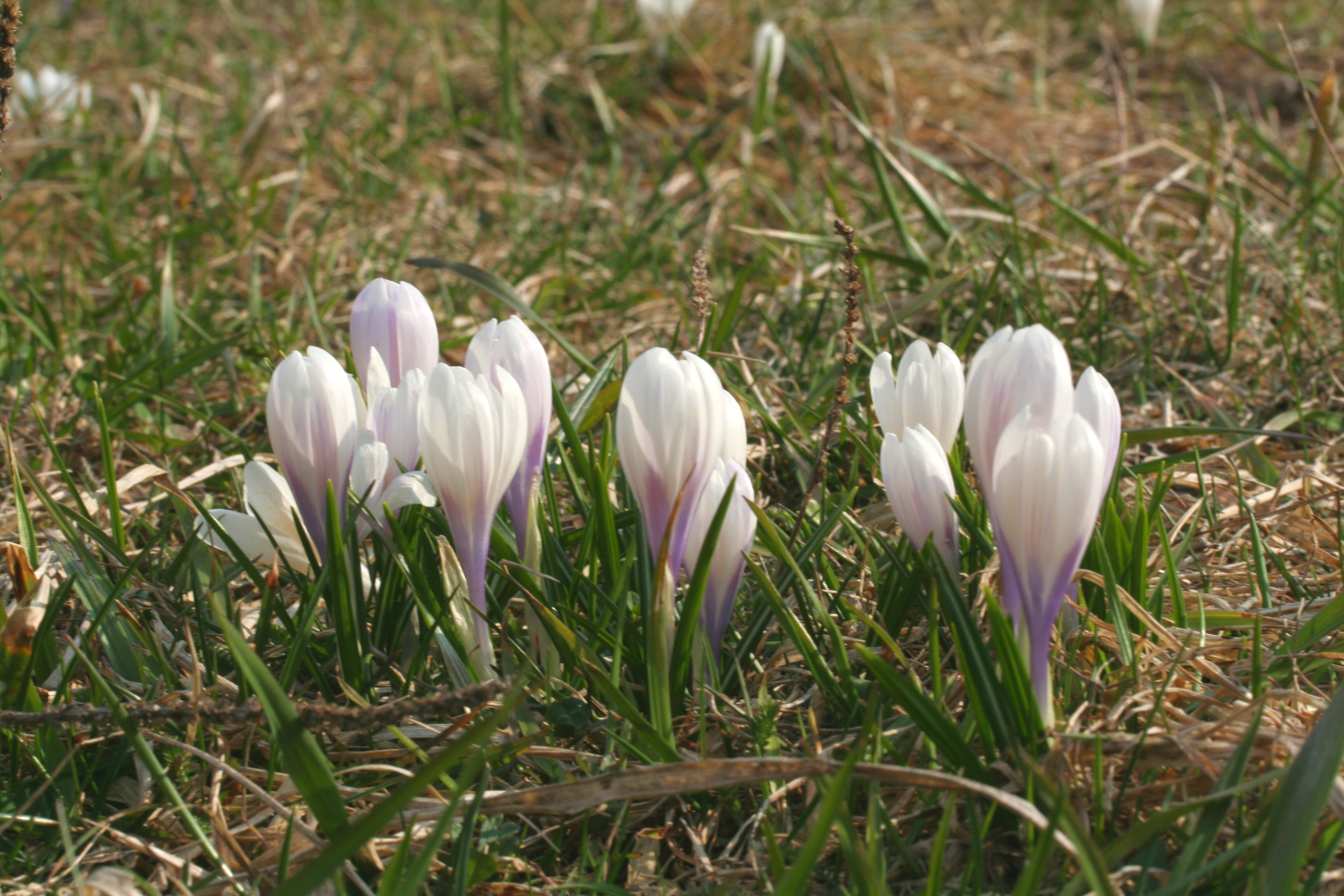 Crocus_albiflorus (Zafferano alpino) Localita: Valmorel, Limana (BL), 800 m s.l.m.